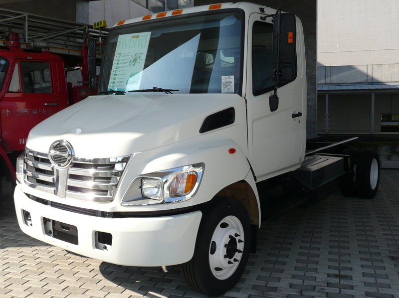 Hino 165 Hybrid.